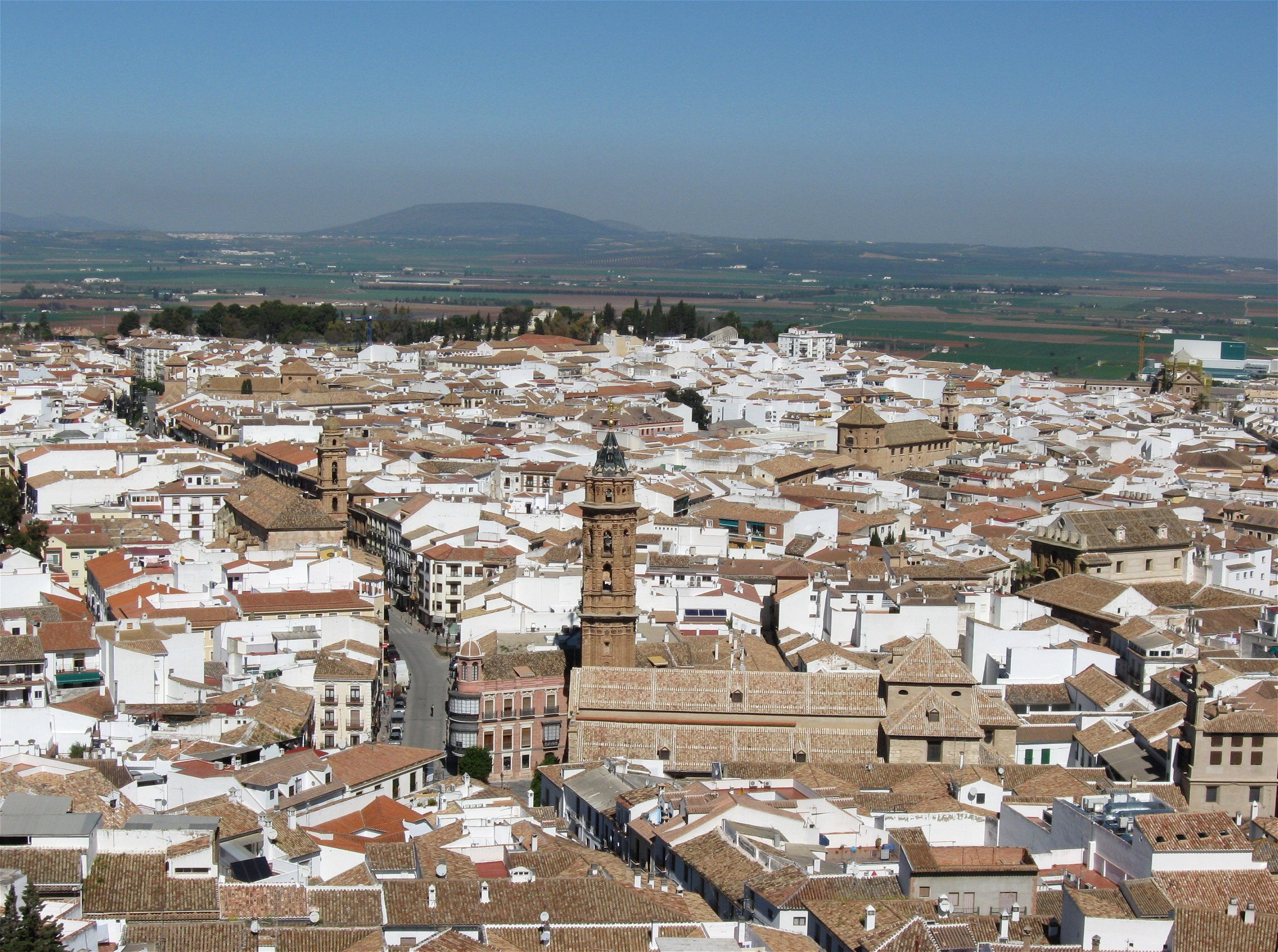 Antequera, Málaga